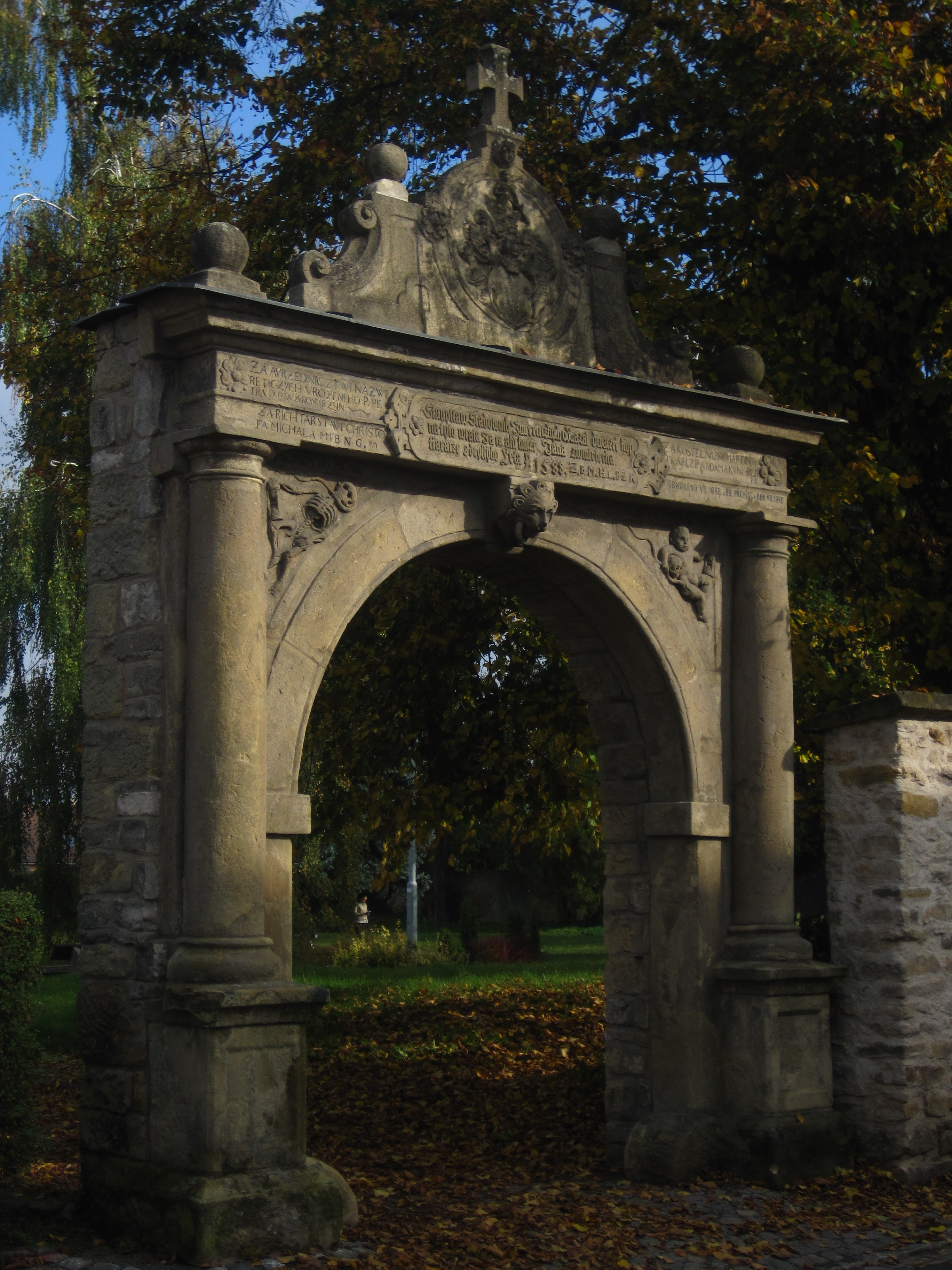 Kostel svaté Barbory, Boleslavská, Bakov nad Jizerou.